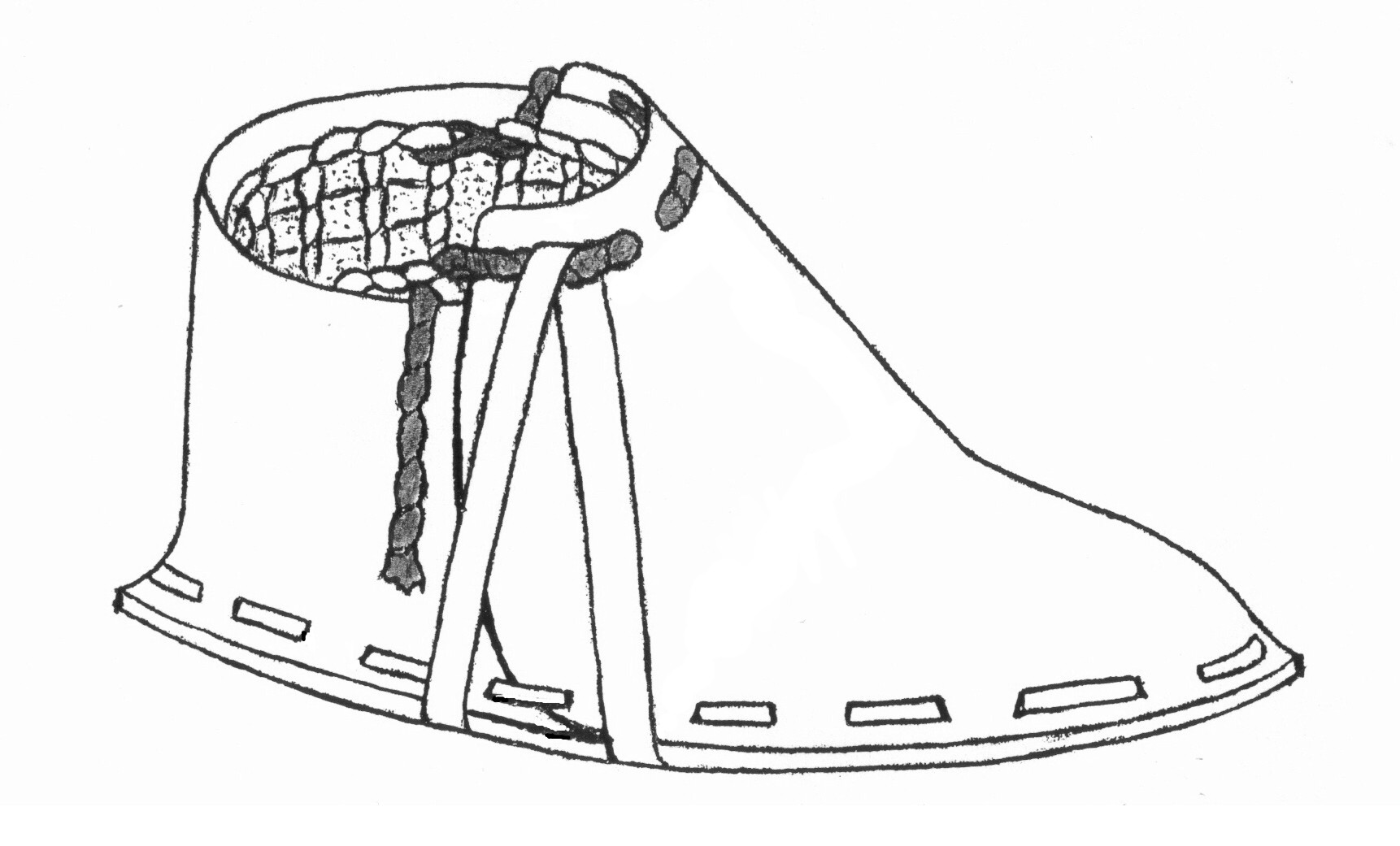 Rechter Schuh des Ötzi (Konstruktionszeichnung). Gefütterter Fellschuh aus den Alpen, 3300 v.Chr. (Kupferzeit). Oberleder: Rothirschfell. Sohle: Braunbärfell. Futter: Von einem Netz aus Lindenbast gehaltenes Gras. Separat geschnittenes Vorder- und Fersenteil, zusammengehalten durch je ein gespreiztes Lederband auf jeder Schuhseite. Ein Schnürsenkel aus Lindenbast.